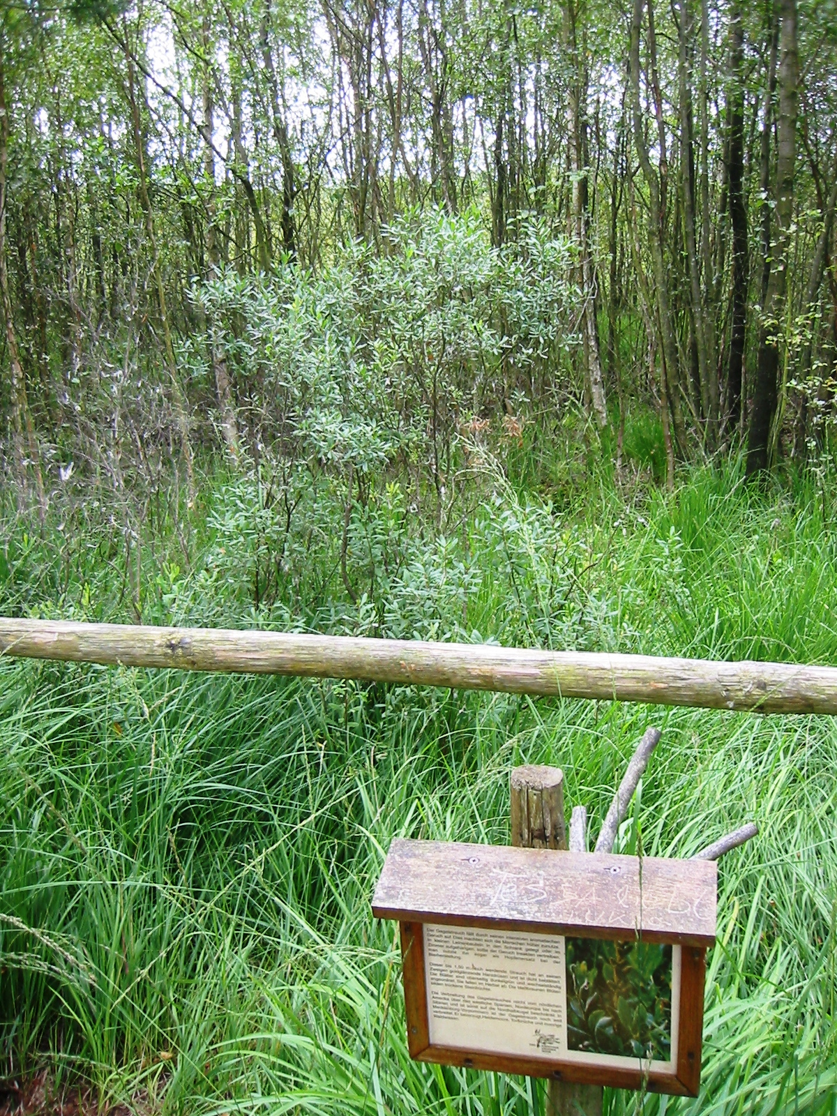 Impressionen vom Naturschutzgebiet Ribnitzer Großes Moor, einem Naturschutzgebiet in Mecklenburg-Vorpommern; Infotafel Gagelstrauch